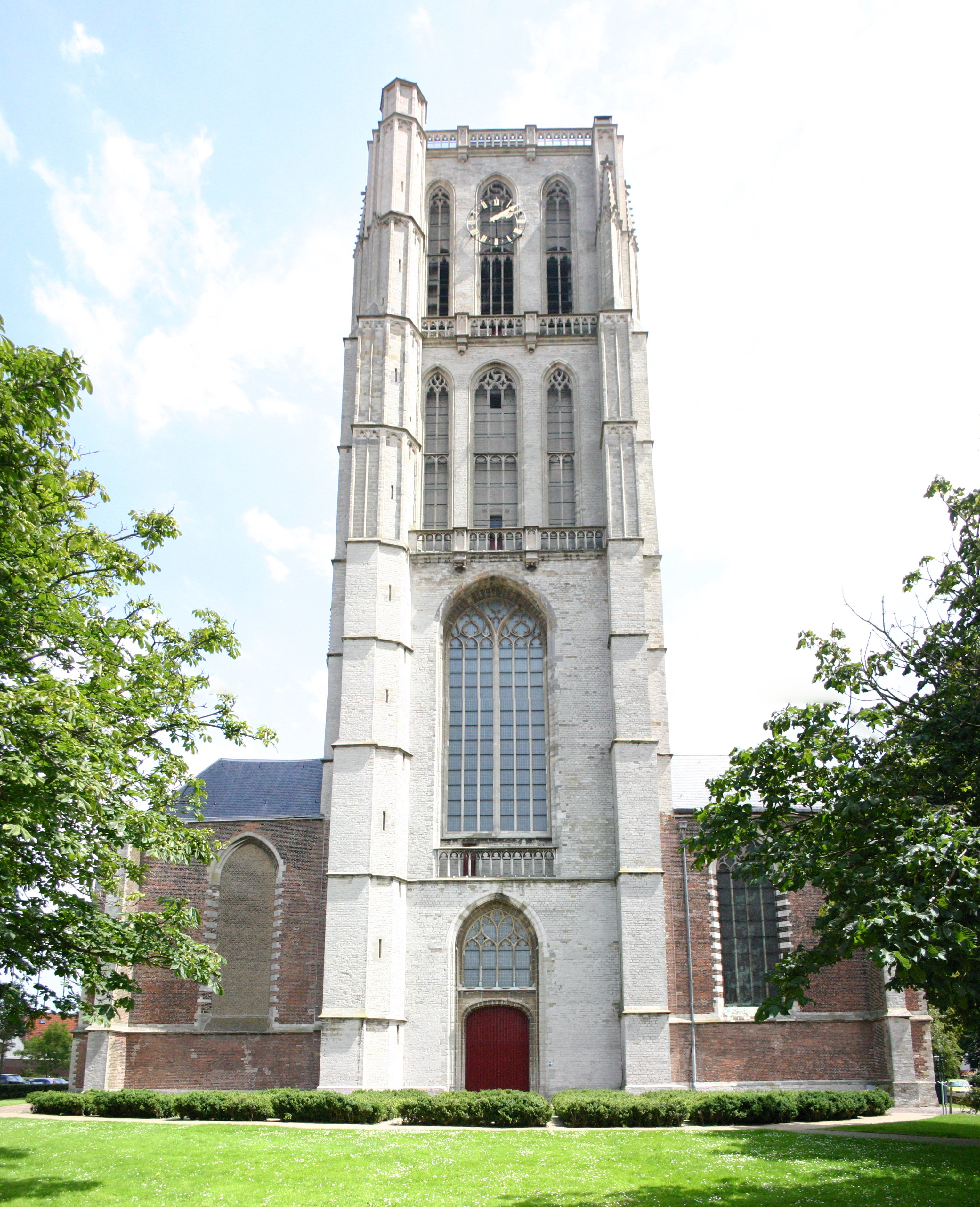 Sint Catharijnekerk, église inachevée de Brielle (Hollande-Méridionale)